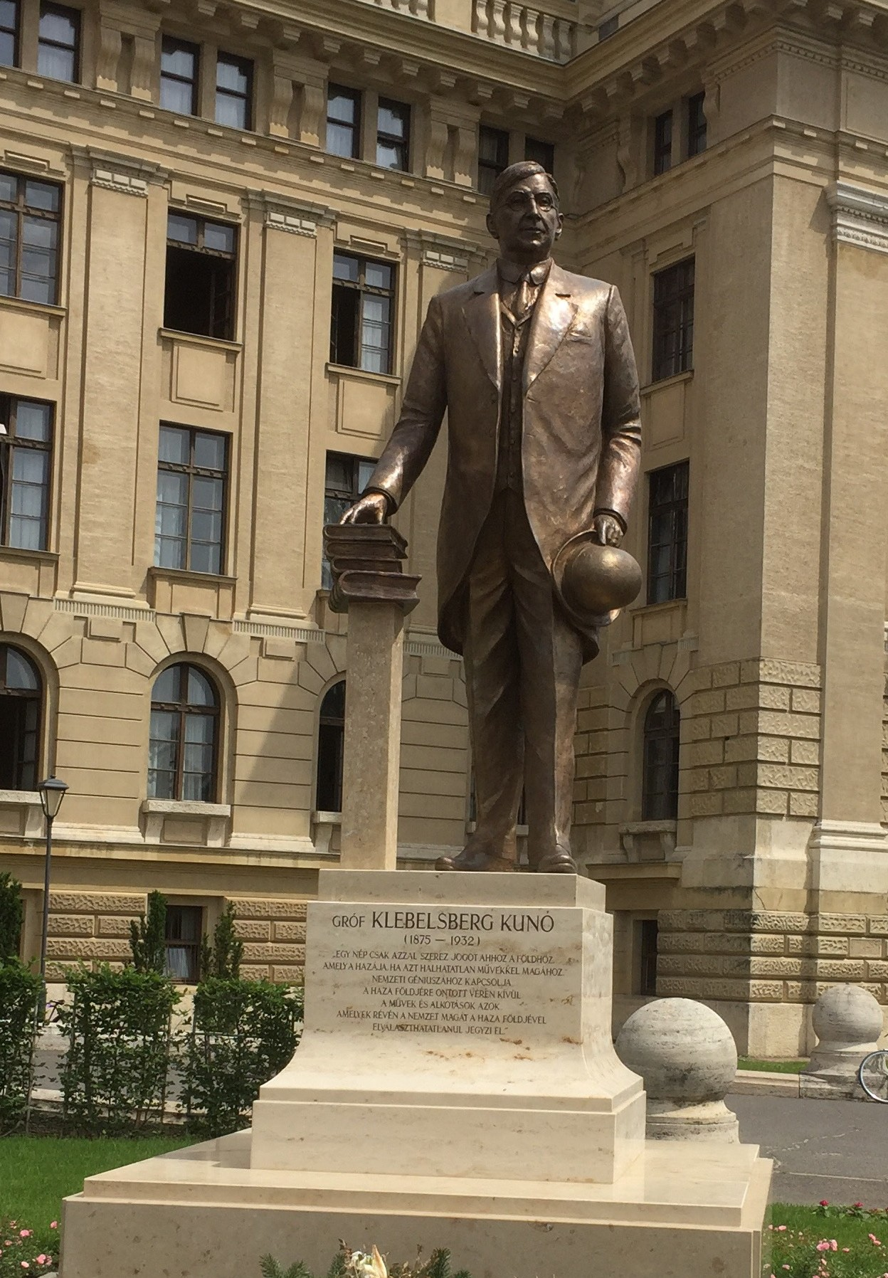 Klebelsberg Kunó szobra Debrecenben